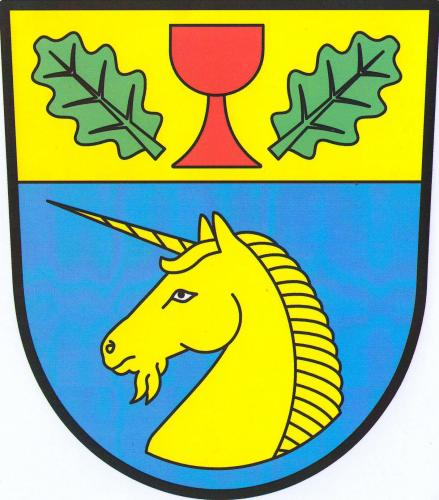 Znak obce Libenice